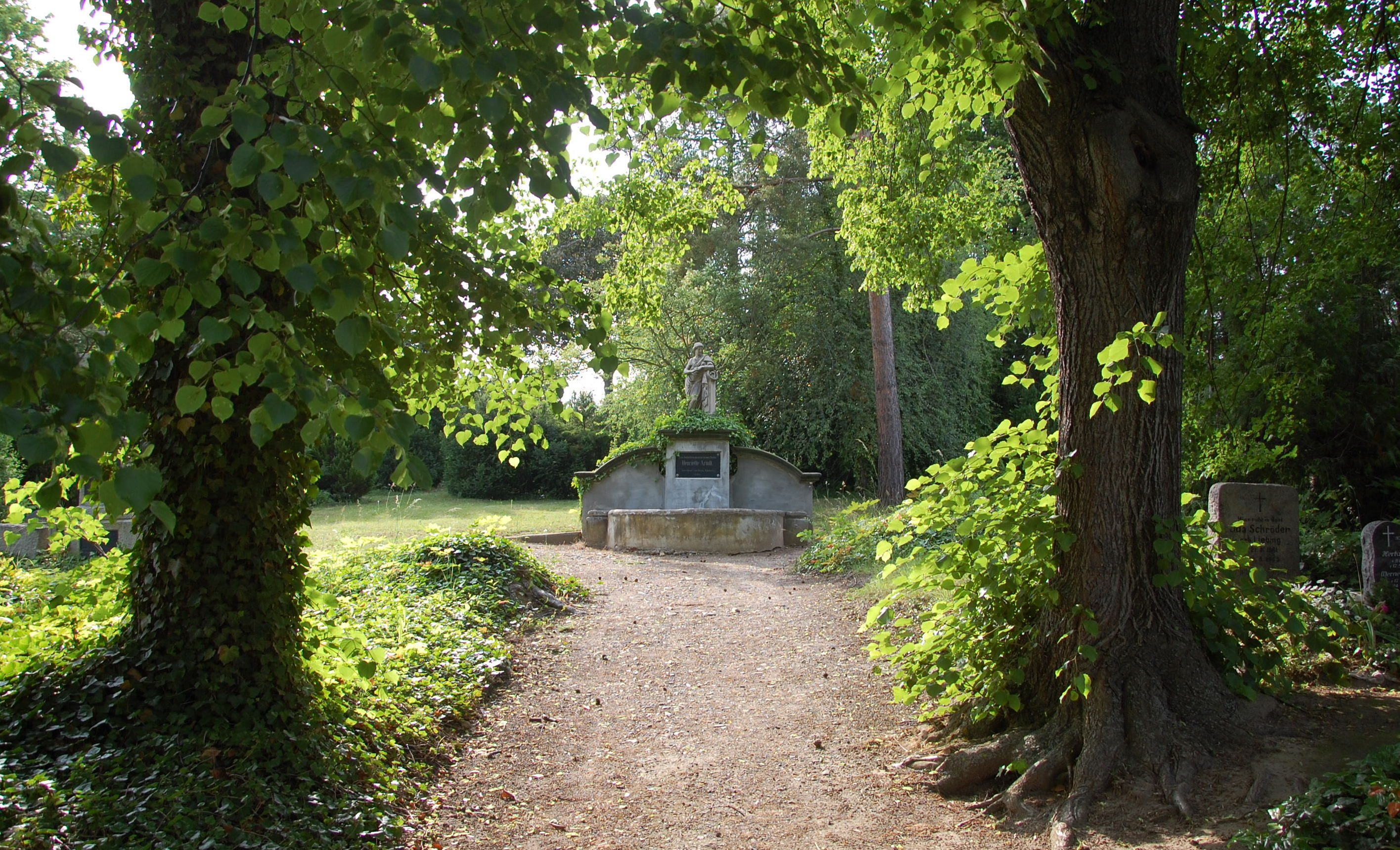 Grabmal auf dem Ägidiifriedhof in Quedlinburg